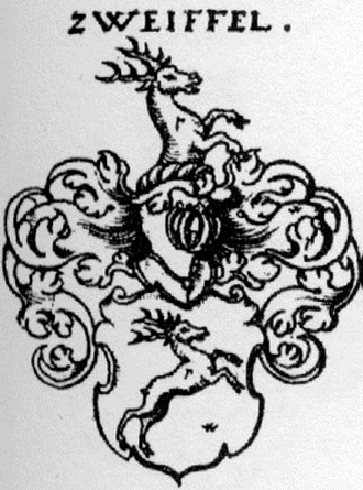 Coat of arms Zweiffel